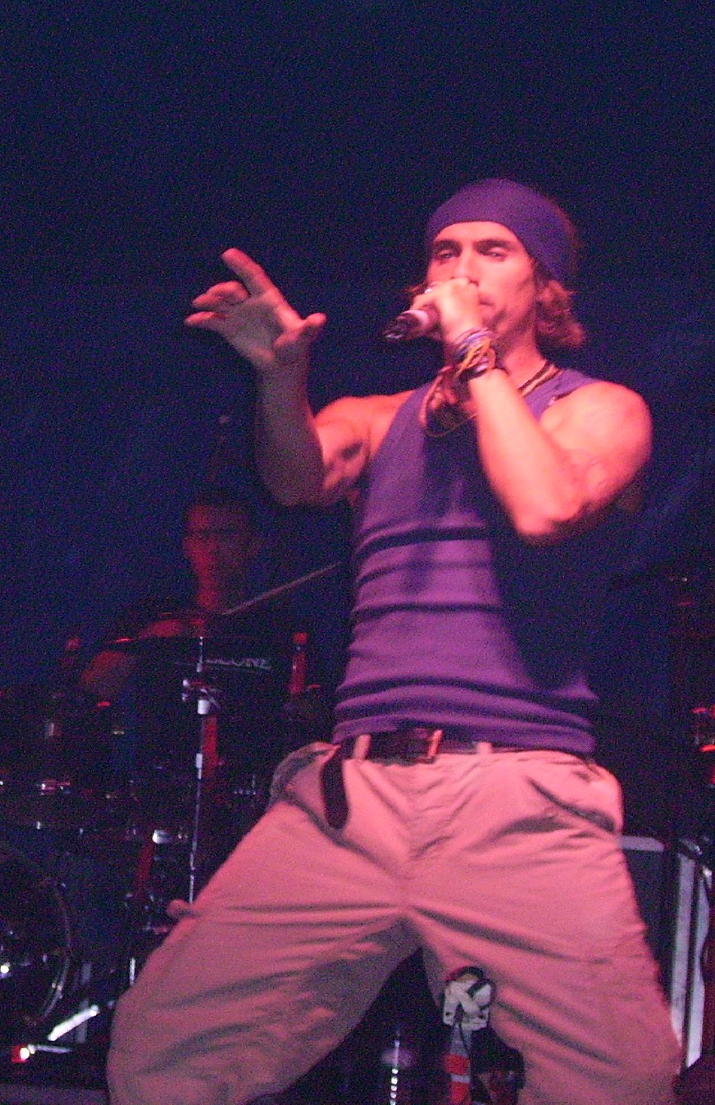 Macaco en un concierto en Badajoz